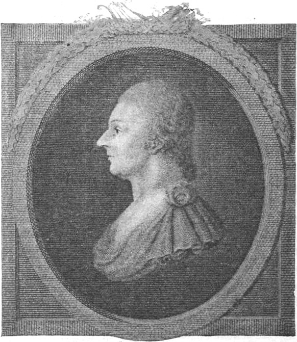 Franciszek Ksawery Dmochowski - ilustracja z książki "Album biograficzne zasłużonych Polaków i Polek wieku XIX"